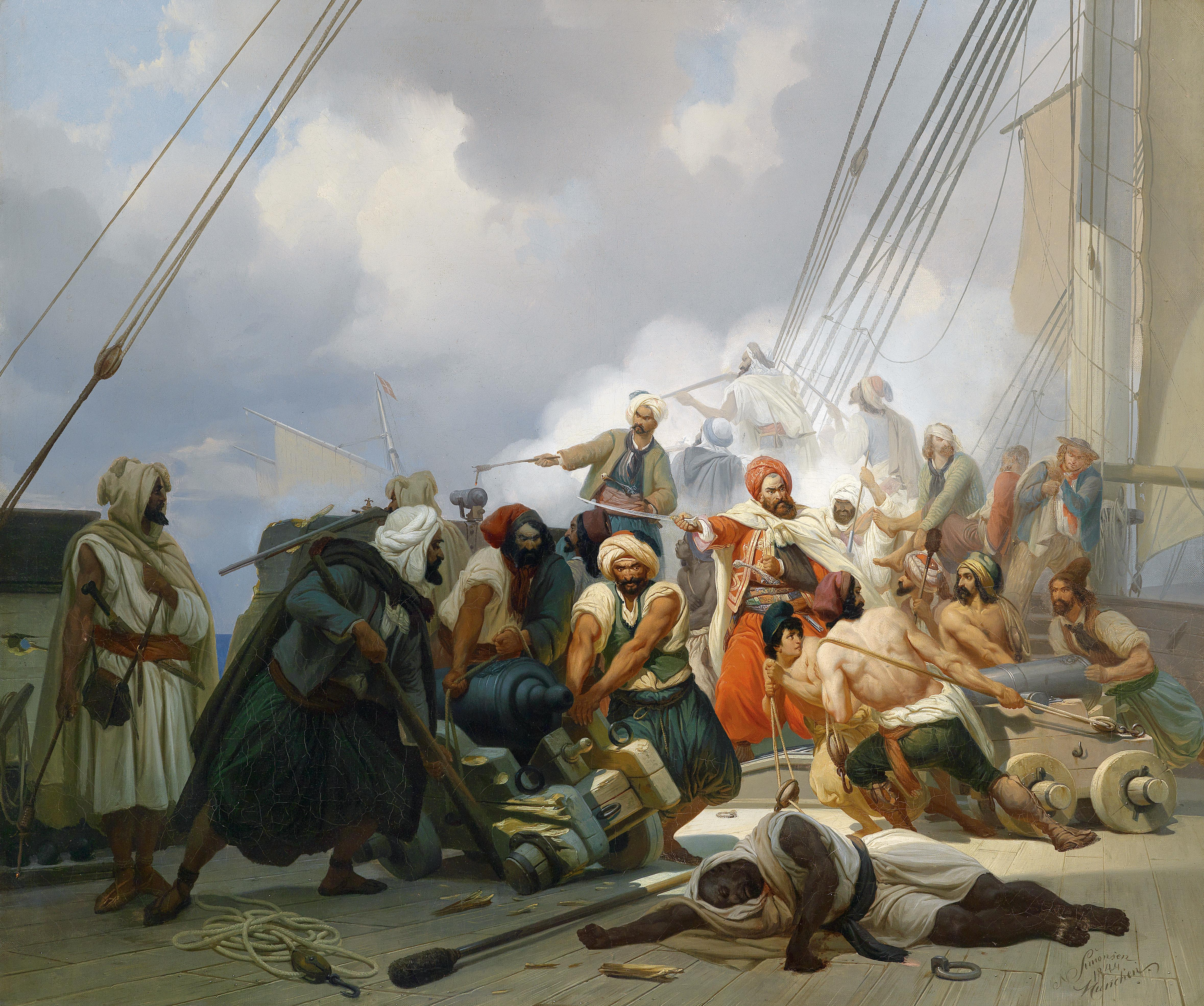 Seegefecht (Kanonen werden an Deck in Stellung gebracht), signiert, datiert N. Simonsen München 1844, rückseitig bezeichnet mit Stempel am Keilrahmen sowie auf der Rückseite Privat Eigenthum S. M. des Kaisers Franz Joseph ,Öl auf Leinwand, 70 x 83 cm, Provenienz: Privateigentum Kaiser Franz-Joseph; Melanie von Habsburg; deren Erben